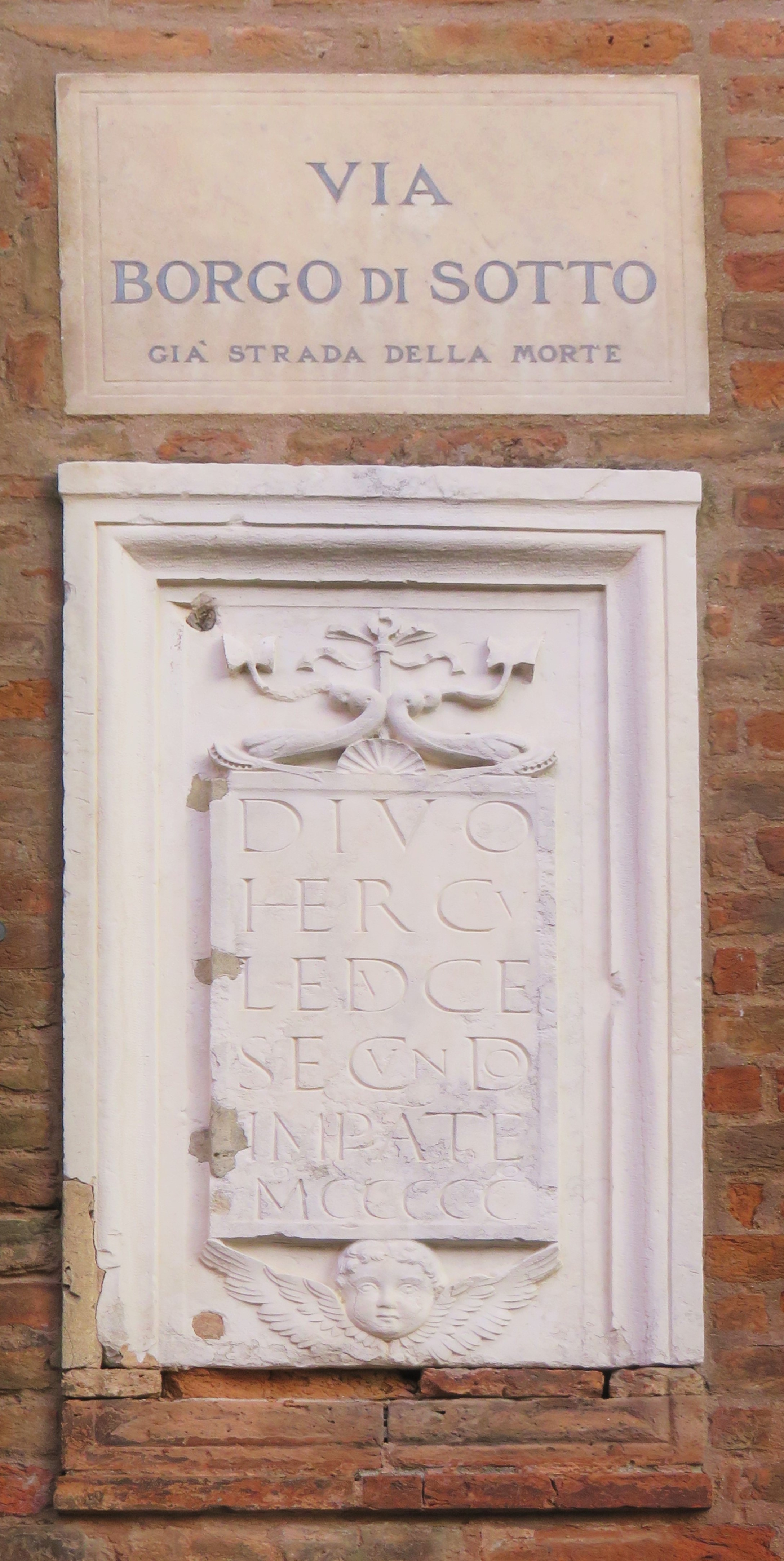 Antica via di Ferrara appartenente ai primi insediamenti urbani Testo scolpito: DIVO HERCU LE DUCE SECUNDO IMPERANTE MCCCCC